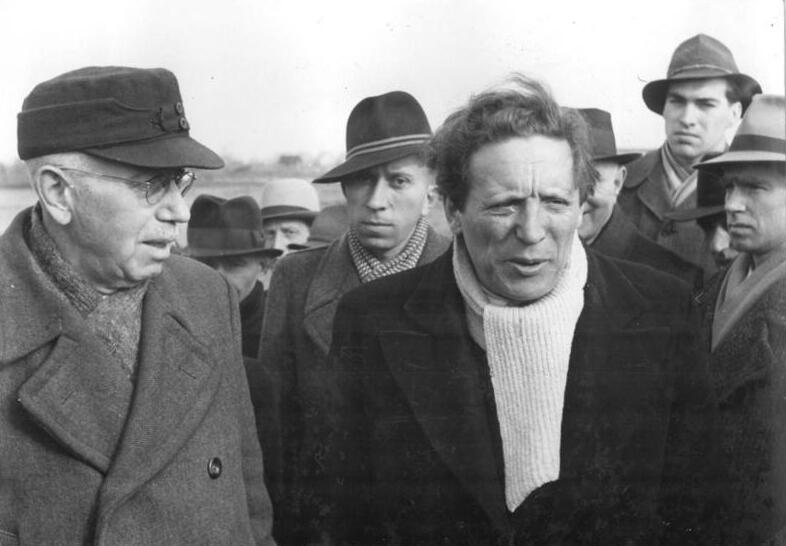 Fortbildung zu Melioration Illus Pietsch 15.3.1951 Praktische Maßnahmen zur Gewinnung neuen Grünlandes. Kursus über Grünlandschnellschätzung an der Universität Rostock. Kürzlich führte die landwirtschaftliche Fakultät der Universität Rostock einen Kursus über Grünlandschnellschätzung durch, an dem 85 Vertreter der MAS, VdgB, (BHg) und verschiedener landwirtschaftlicher Kommissionen Mecklenburgs teilnahmen. Professor Petersen erläuterte diesen Vorgang zur Gewinnung neuen Grünlandes wie z.B. die Senkung des Wasserspiegels und Bodenuntersuchungen zur Regulierung des Wasserstandes auf Wiesengelände. UBz: Professor Petersen (rechts mit weißem Schal) in der Diskussion über die Regulierung des Wasserstandes in den Wiesen.